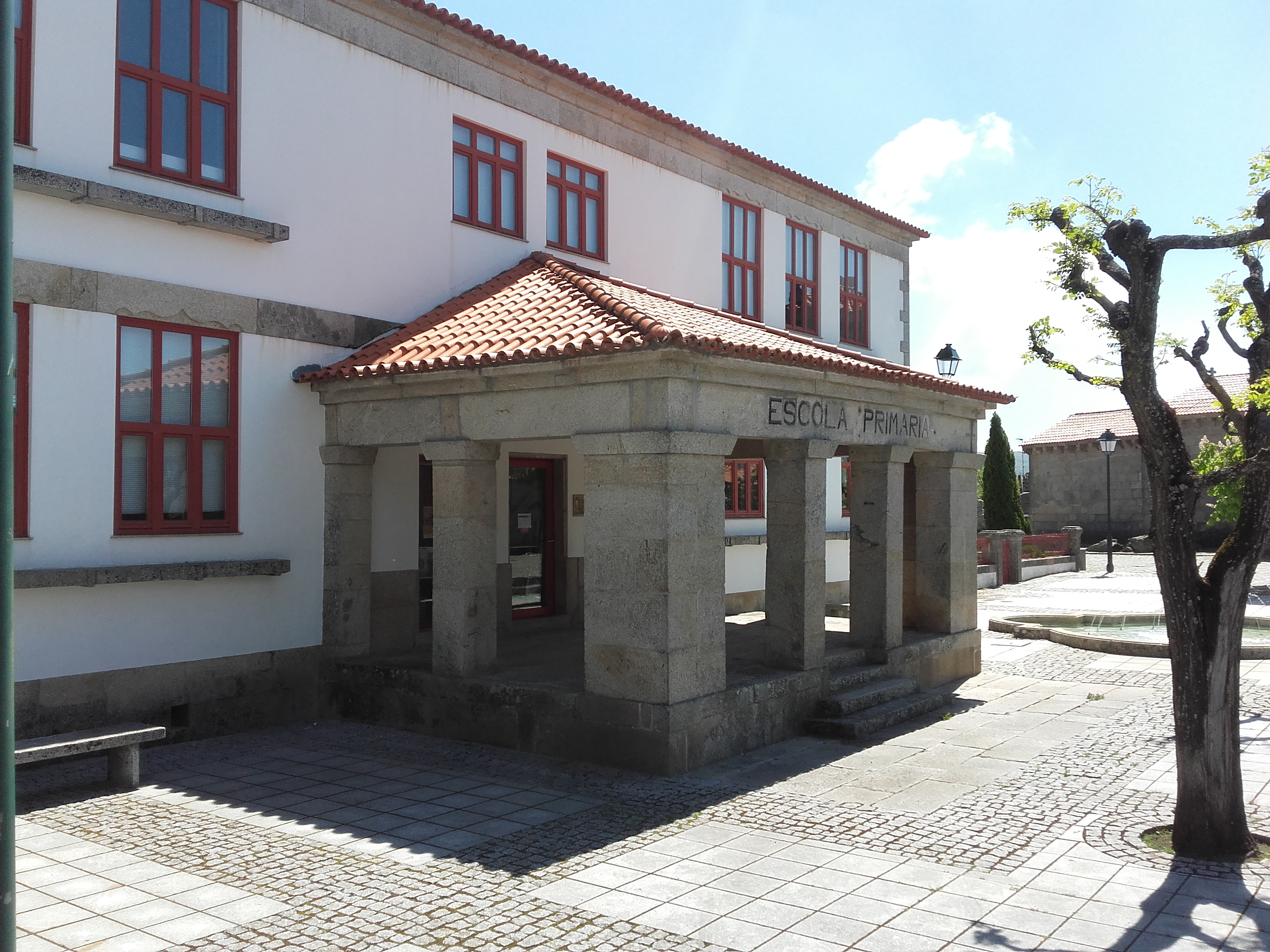 Biblioteca municipal de Sernancelhe